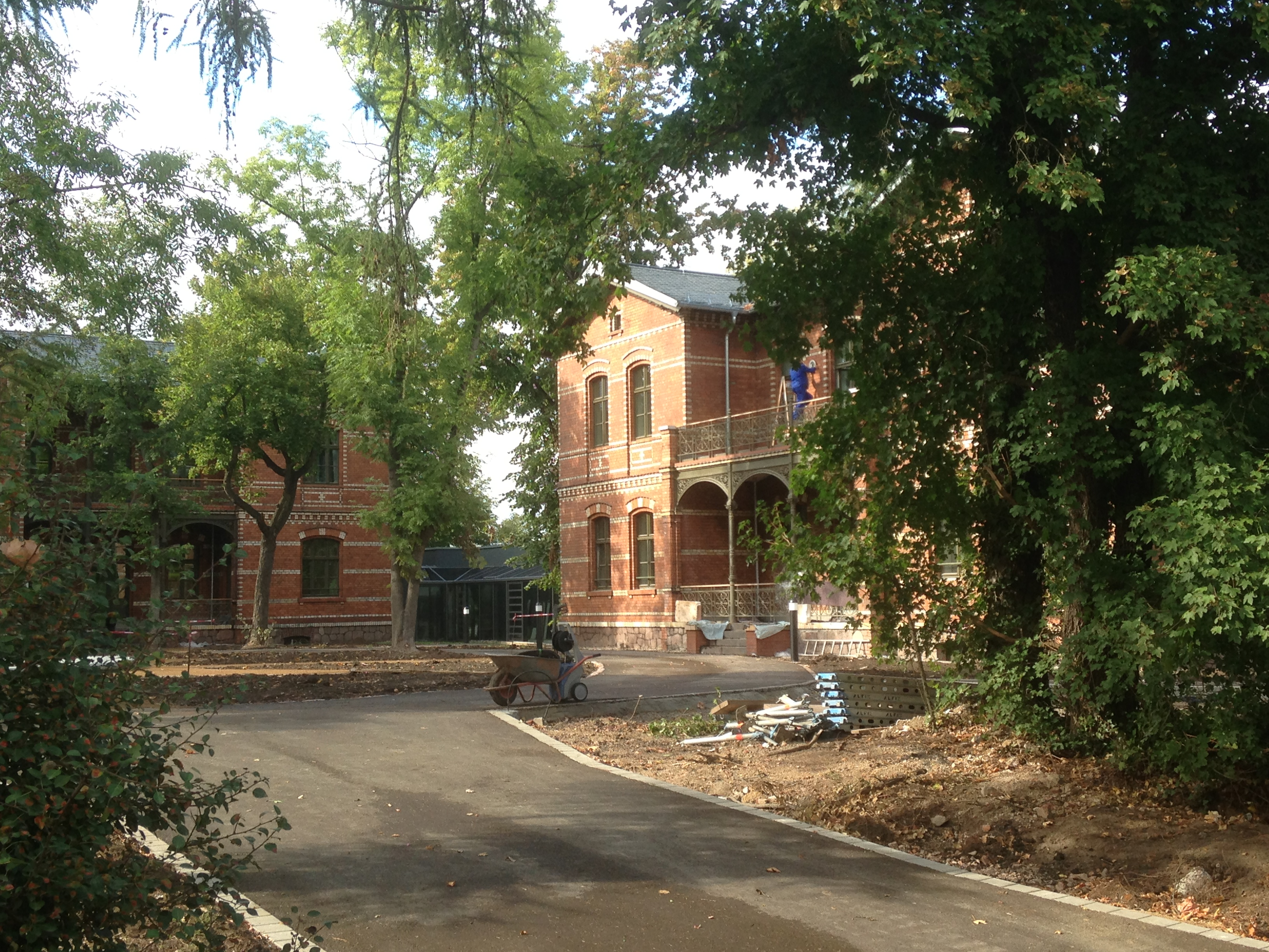 Patientenvillen ehem. Irrenanstalt Nietleben, heute Boardinghaus Weinberg Campus